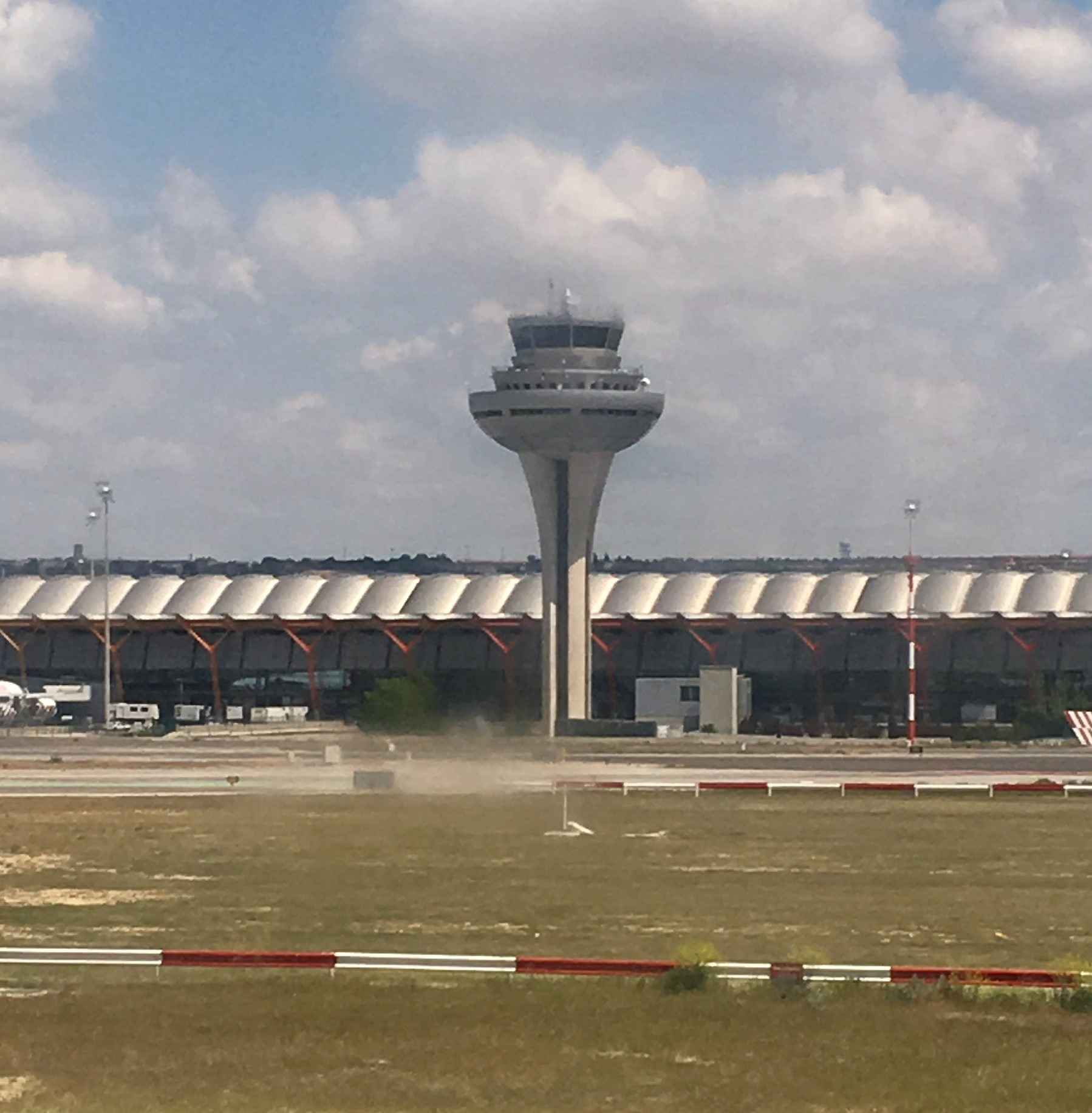 Foto realiazada personalmente desde el aeropuerto.